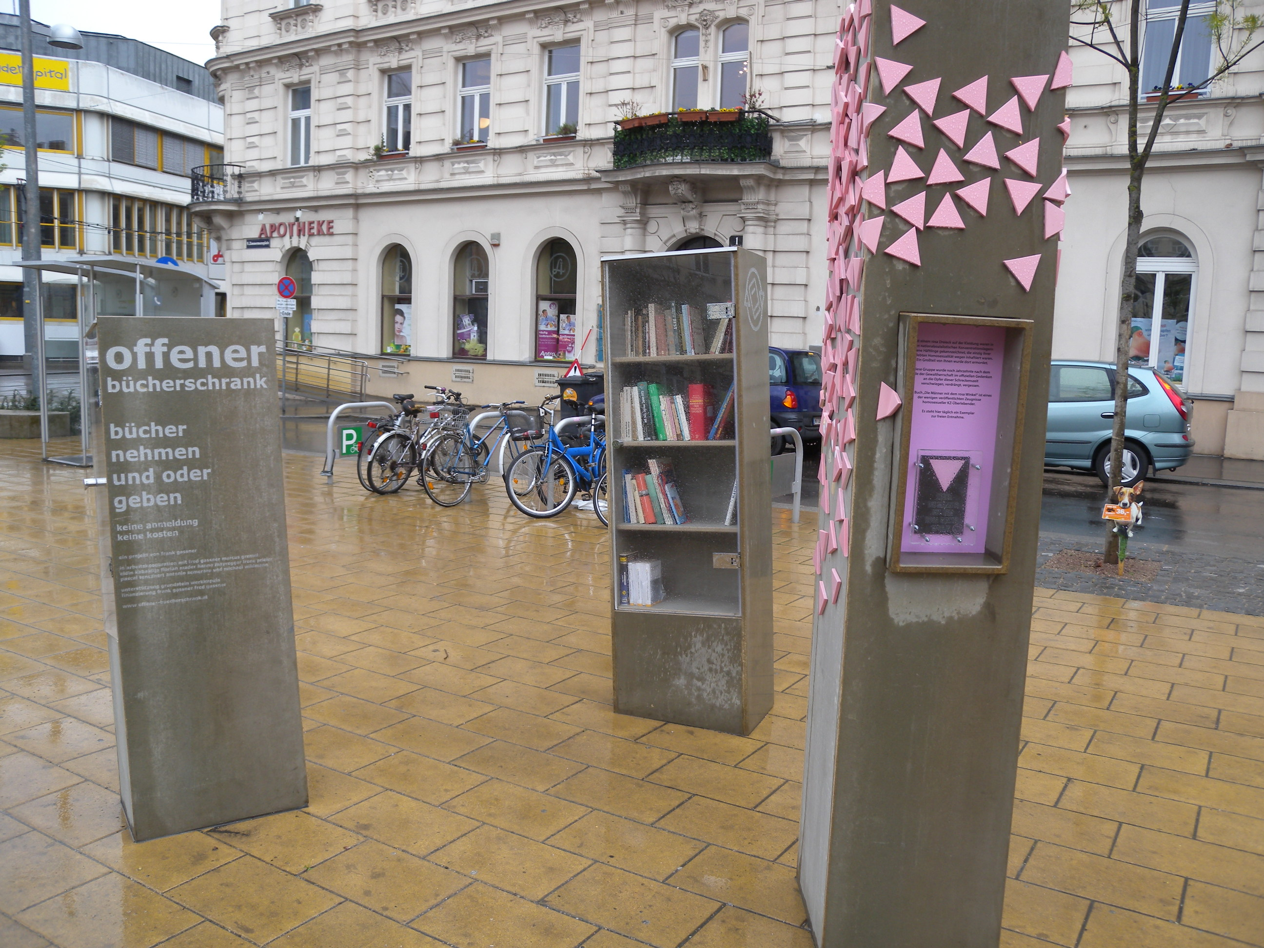 Offener Bücherschrank im Heinz-Heger-Park, 1090 Wien